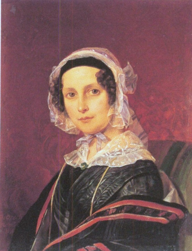 Наталья Владимировна Оболенская (1820-1895), дочь В.П.Мезенцева (1779-1833) и внучки Суворова, графини В.Н.Зубовой(1800-1863); супруга внука поэта Ю.А. Нелединского-Мелецкого, князя Сергея Александровича Оболенского (1819-1882), принявшего имя Оболенского-Нелединского-Мелецкого.